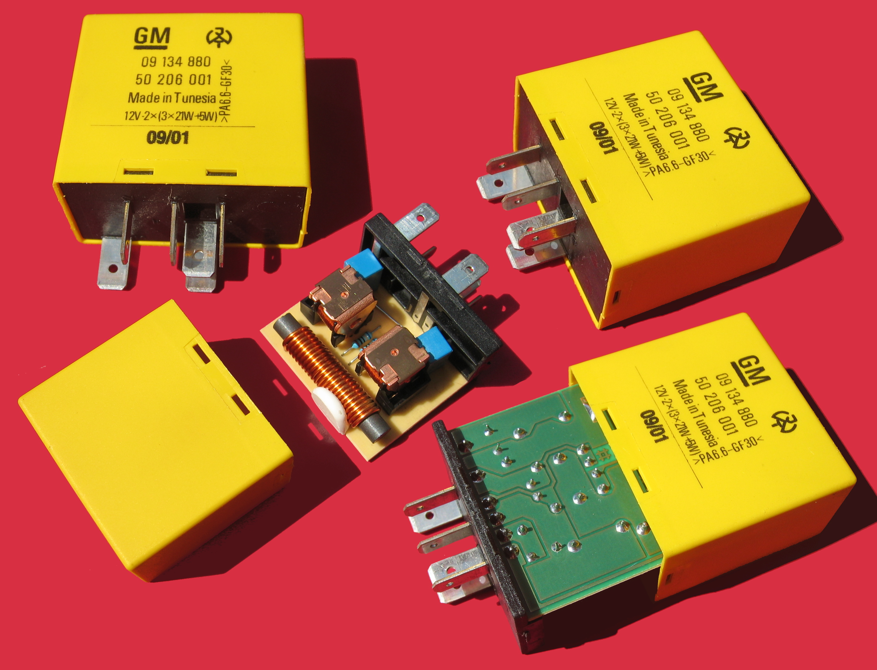 Blinkerrelais Opel / Vauxhall – Astra G / Meriva